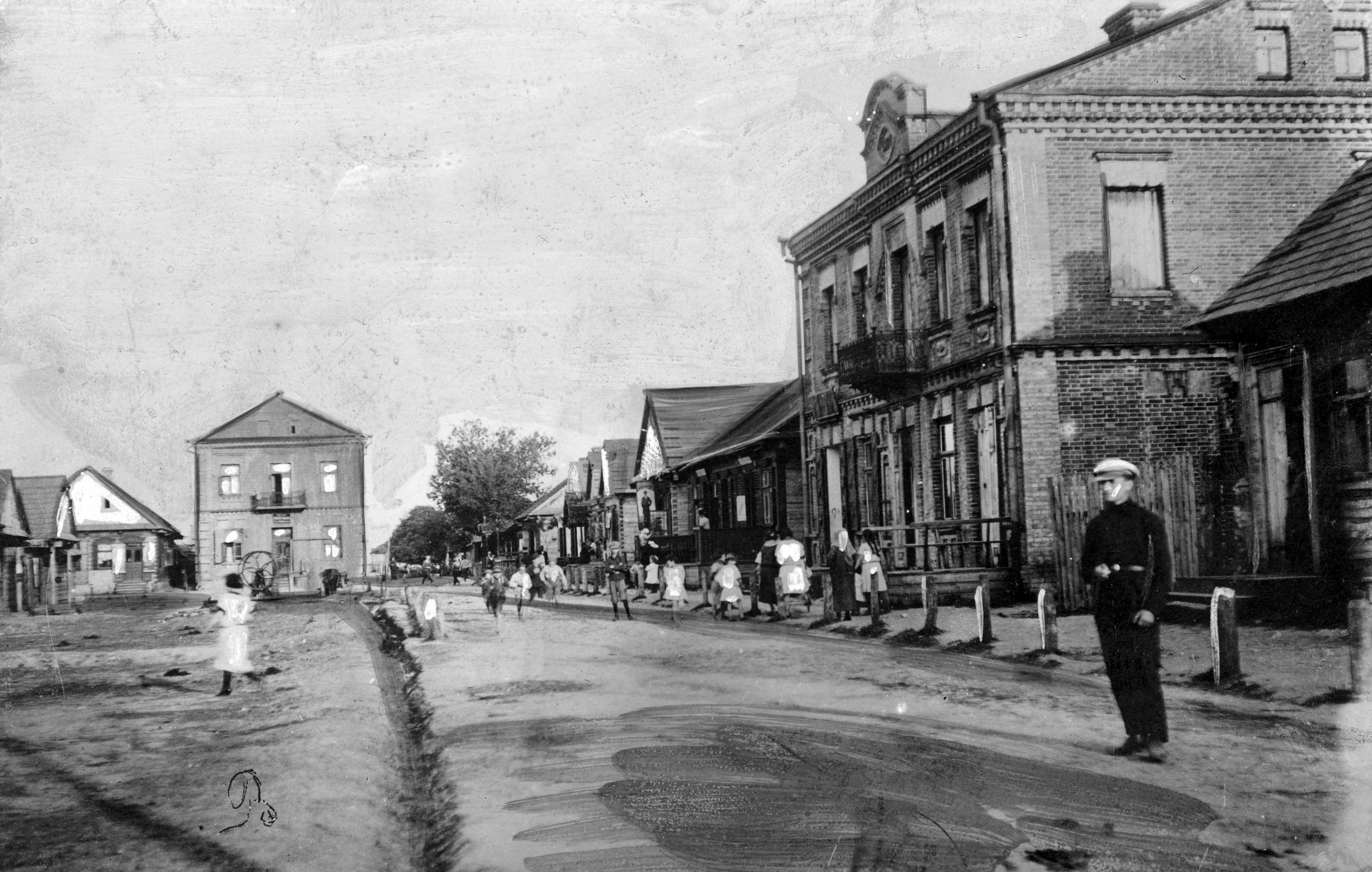 Беларуская (тарашкевіца): Бяроза Картуская (Biaroza Kartuskaja), пляц Рынак (plac Rynak)